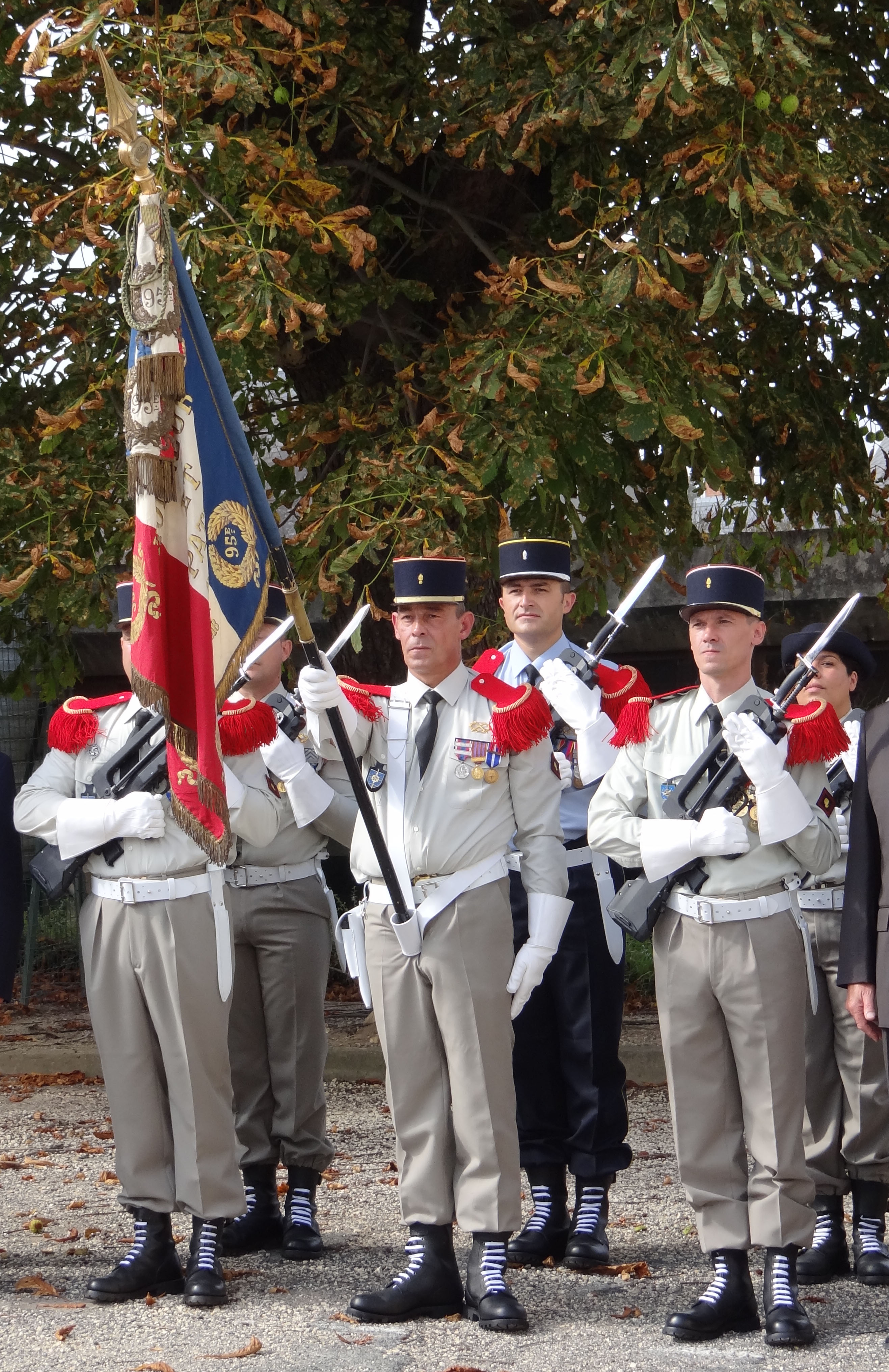 Drapeau du 95e RI et sa garde lors de la commémoration de l'unité le 6 septembre 2014 à Bourges, caserne Condé